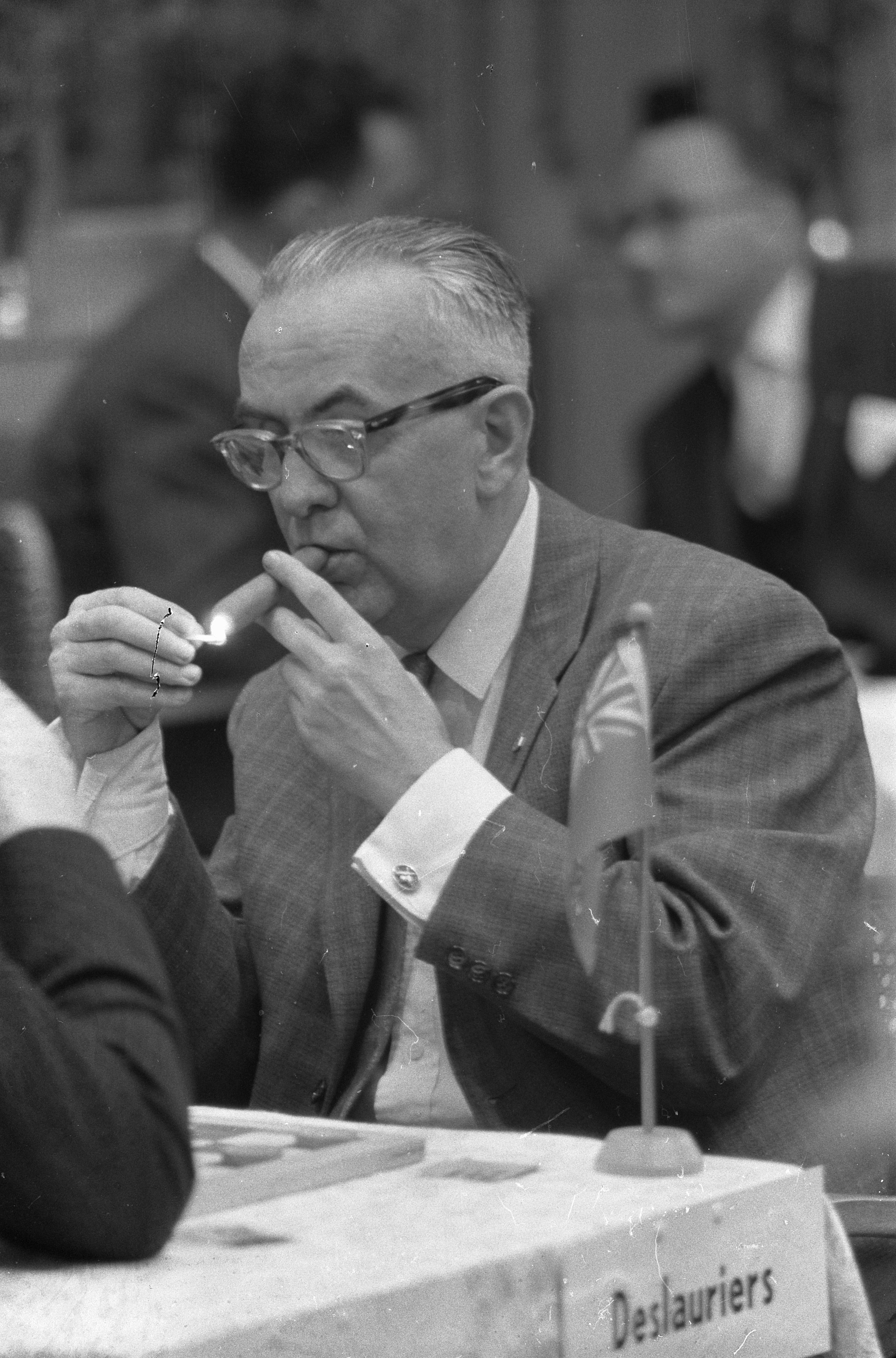 Wereldkampioenschap dammen te Amsterdam, Deslauriers